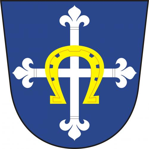 Čmelíny znak